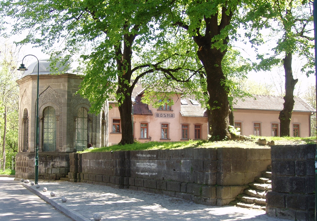 Ottoman Turbe in Bihac, BiH